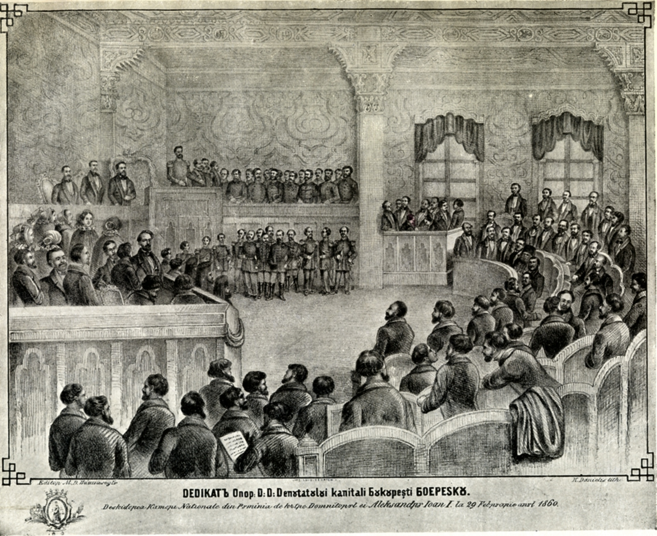 Opening of the Parliament at Bucharest, 29 February 1860 Dedicată Onor. D. D. Deputatului capitali Bucureşti Boerescu Deschiderea Cameri Naţionale din România de către Domnitorul ei Alexandru Ioan I. la 29 Februarie 1860